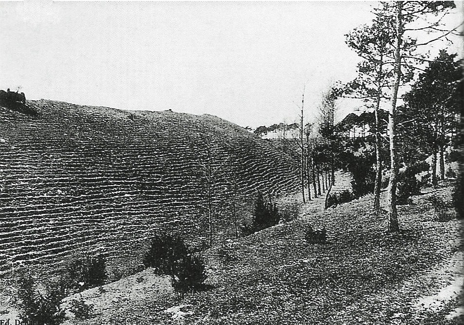 Ancienne carte postale montrant le Camp d'Atilla le talus .